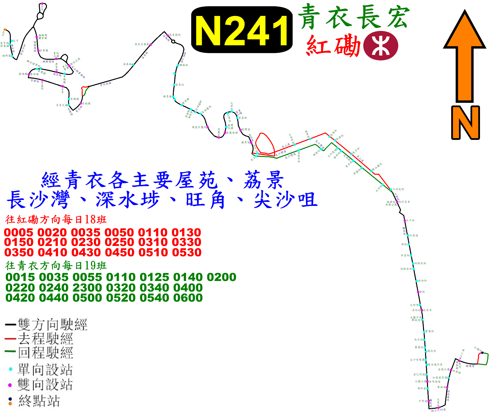 中文（香港）: 九巴N241線的走線圖